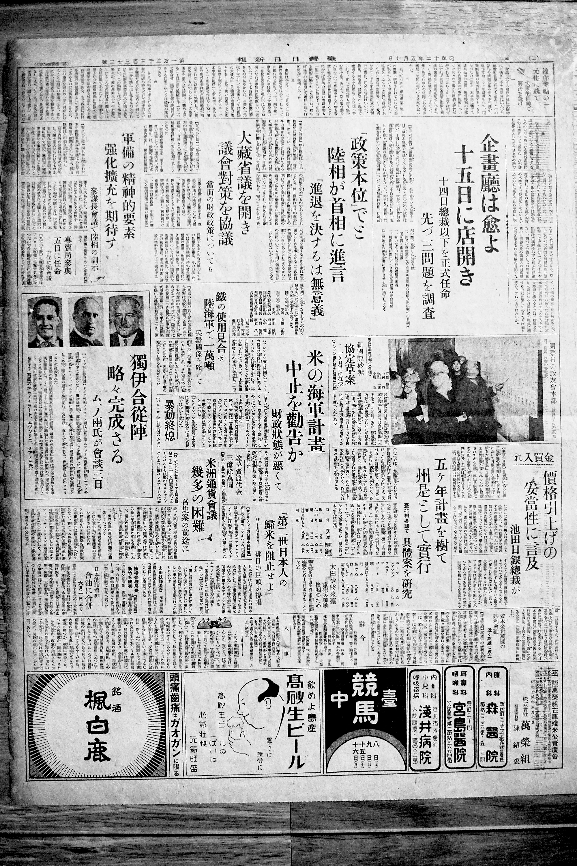 中文（台灣）: 第一萬三千三百三十二號